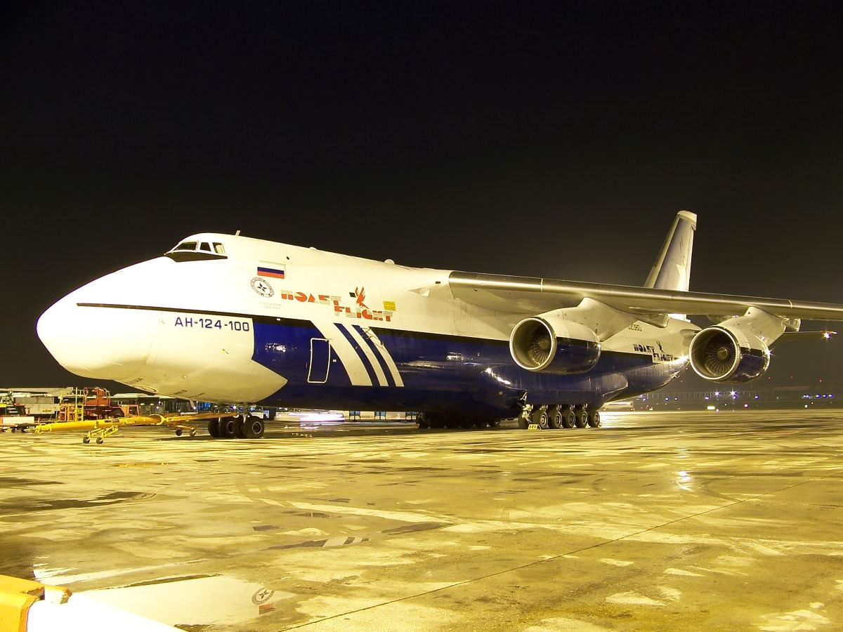 Antonov An-124-100 Rusian cn 9773051462161 BCN / LEBL 2006 Diciembre 02